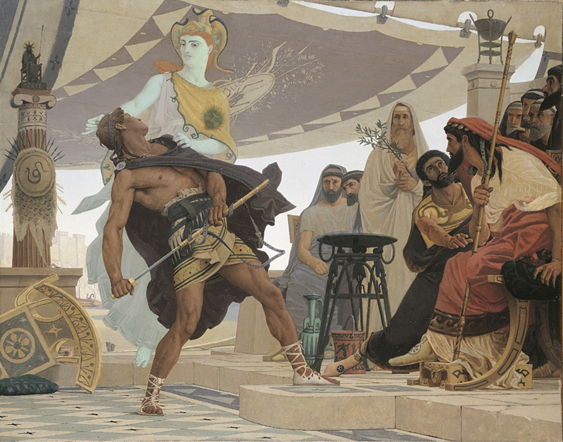 La colère d'Achille, Homer, Ilias 1, 1–5